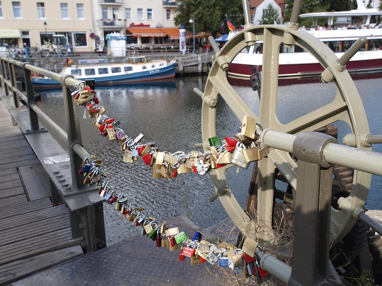 Liebesschlösser an der Bahnhofsbrücke Warnemünde